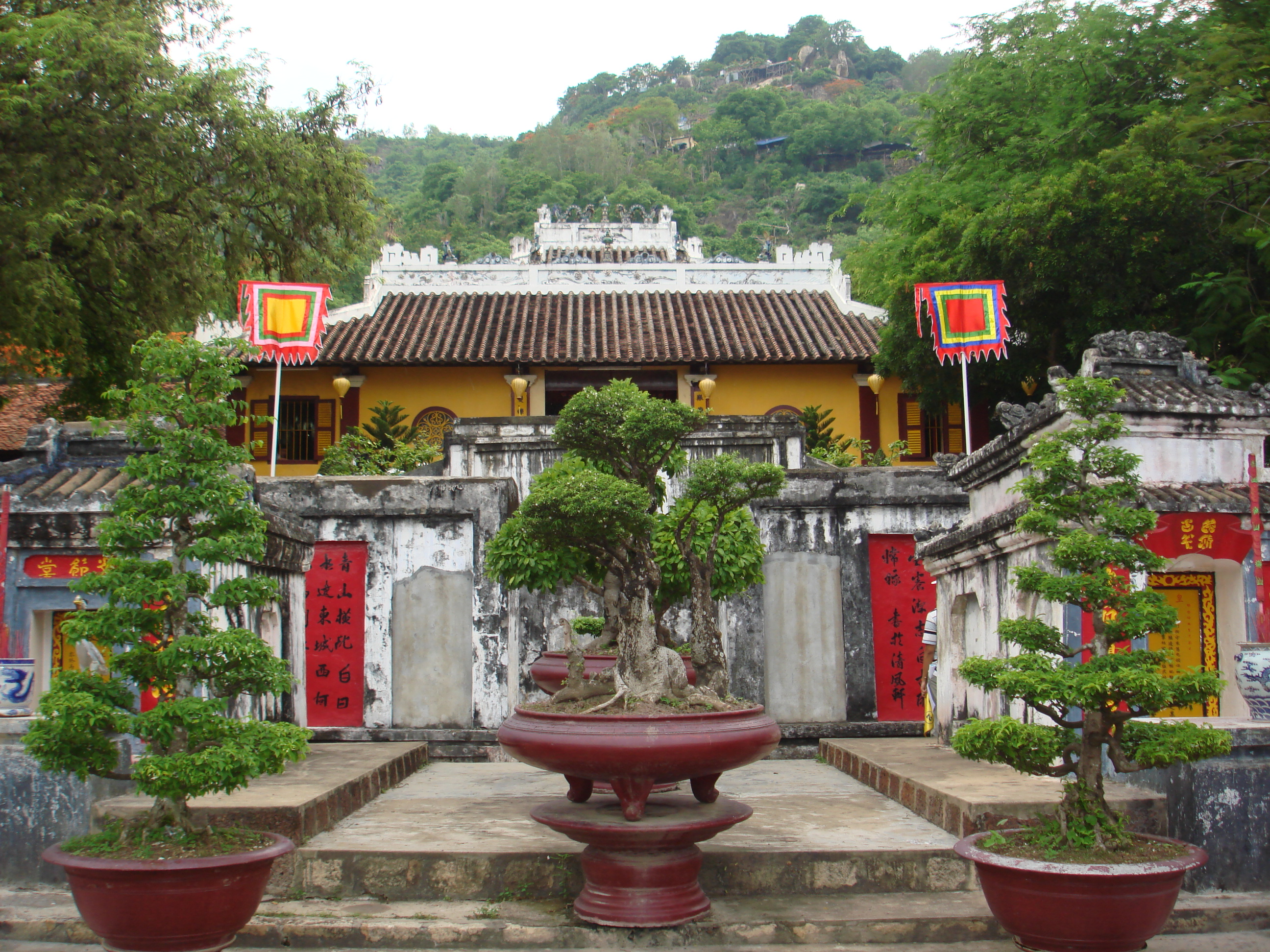 Lăng Thoại Ngọc Hầu toàn cảnh